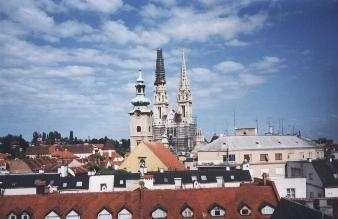 Den katolske katedral i Zagreb